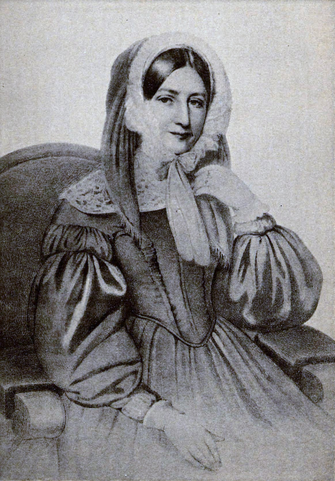 Роксандра Скарлатовна Эдлинг , ур.Стурдза (12 октября 1786 — 16 января 1844), фрейлина, автор мемуаров.